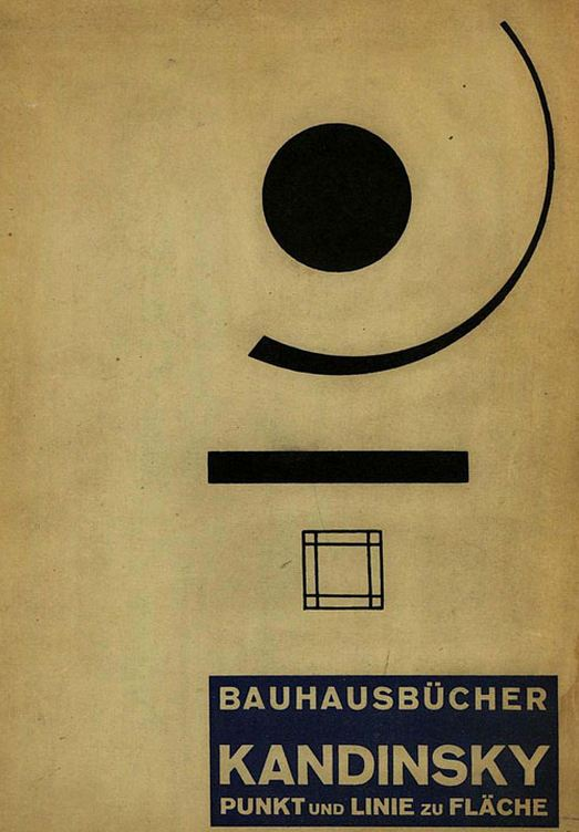 Portada del libro "El punto y la linea sobre el plano" de Wassily Kandinsky